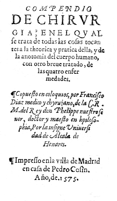 Portada del libro "Compendio de cirugía" de Francisco Díaz. Publicado en Madrid, en 1575.